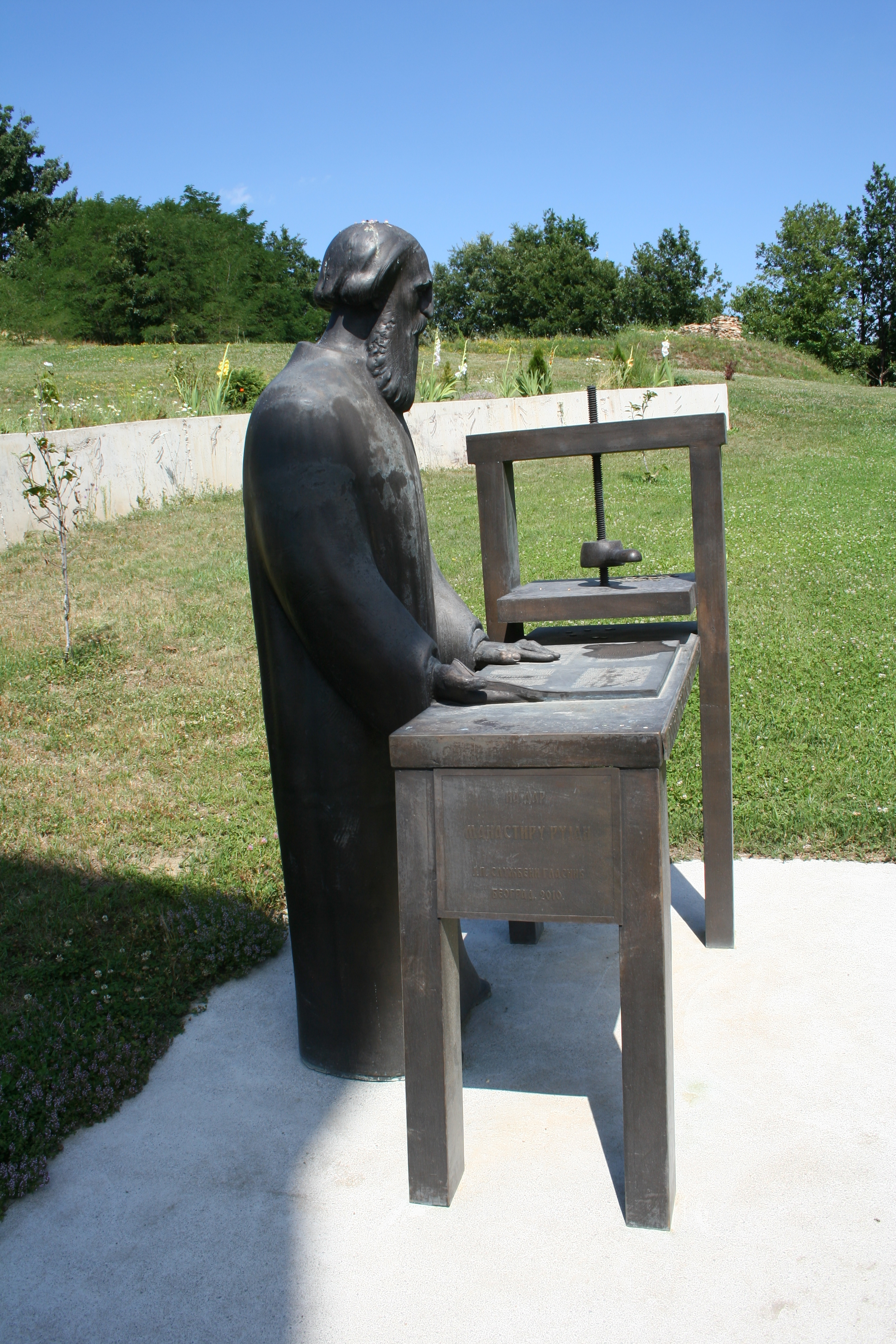 Manastir Rujan